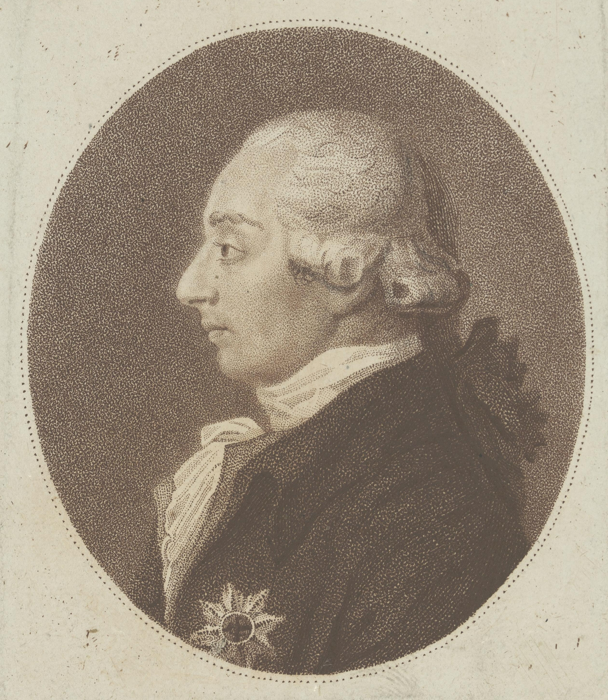 Girolamo Lucchesini Coburg, Kunstsammlungen der Veste Coburg, Inventar-Nr. IV,376,142, Mappe 2, Passepartout 8